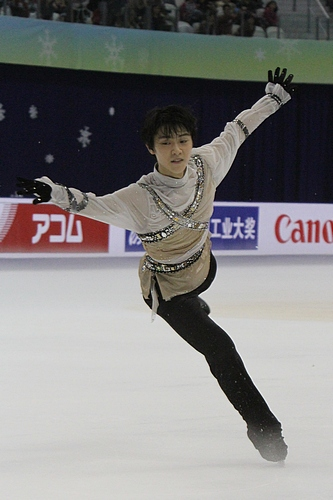 Юдзуру Ханю на Кубке Китая 2011.